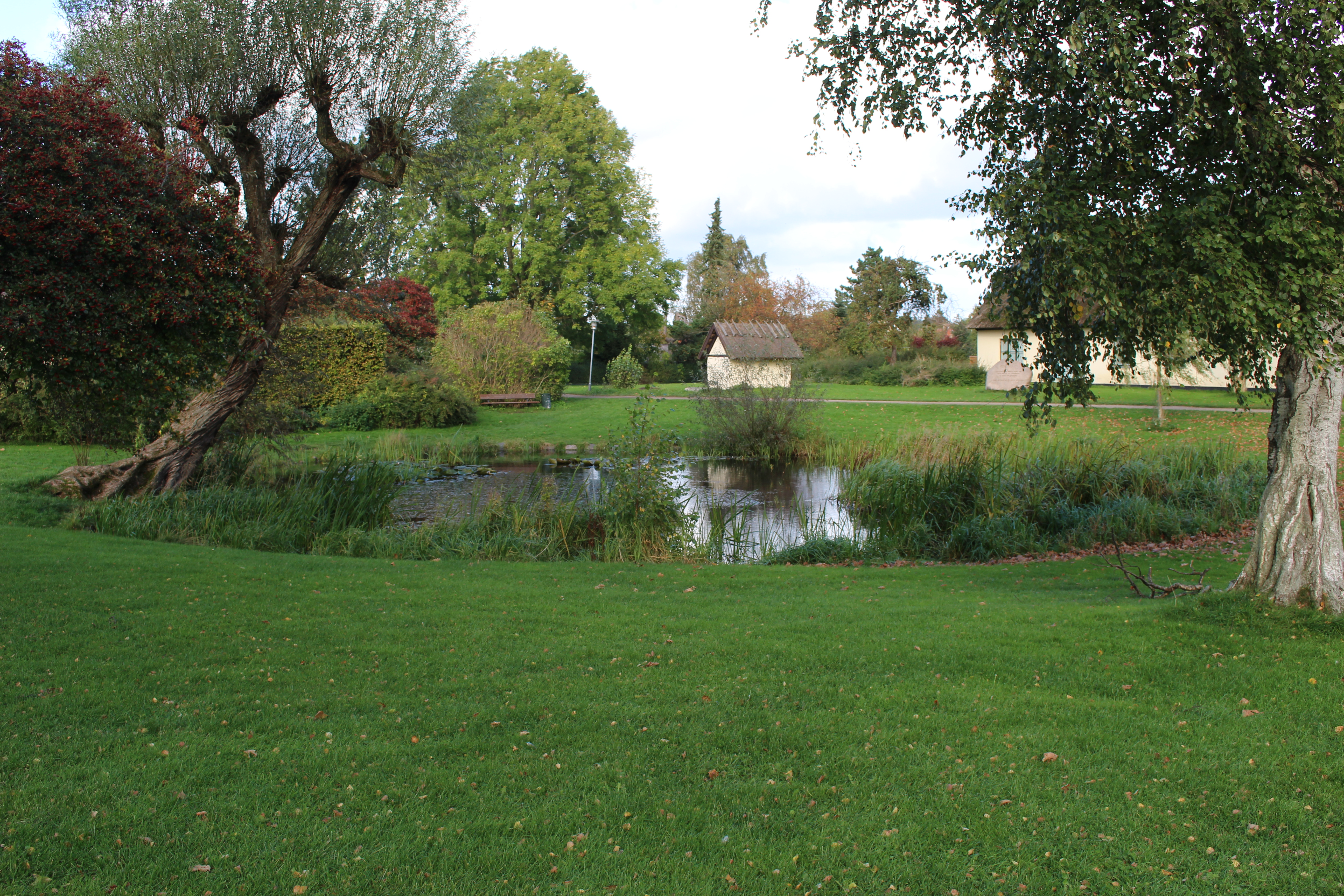 Virum Gadekær, set fra Virumgade